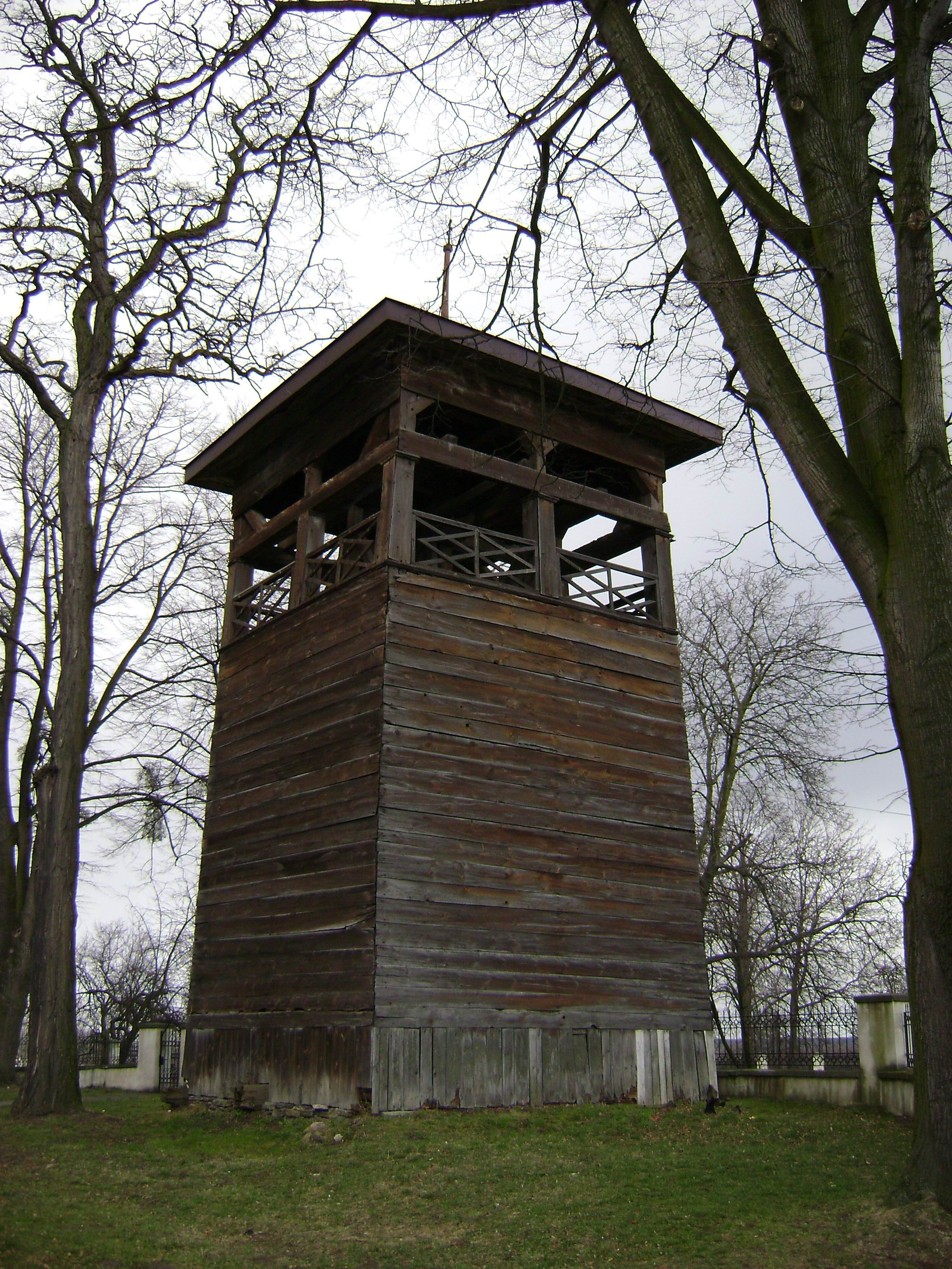 Żarnów - drewniana dzwonnica z I połowy XIX w